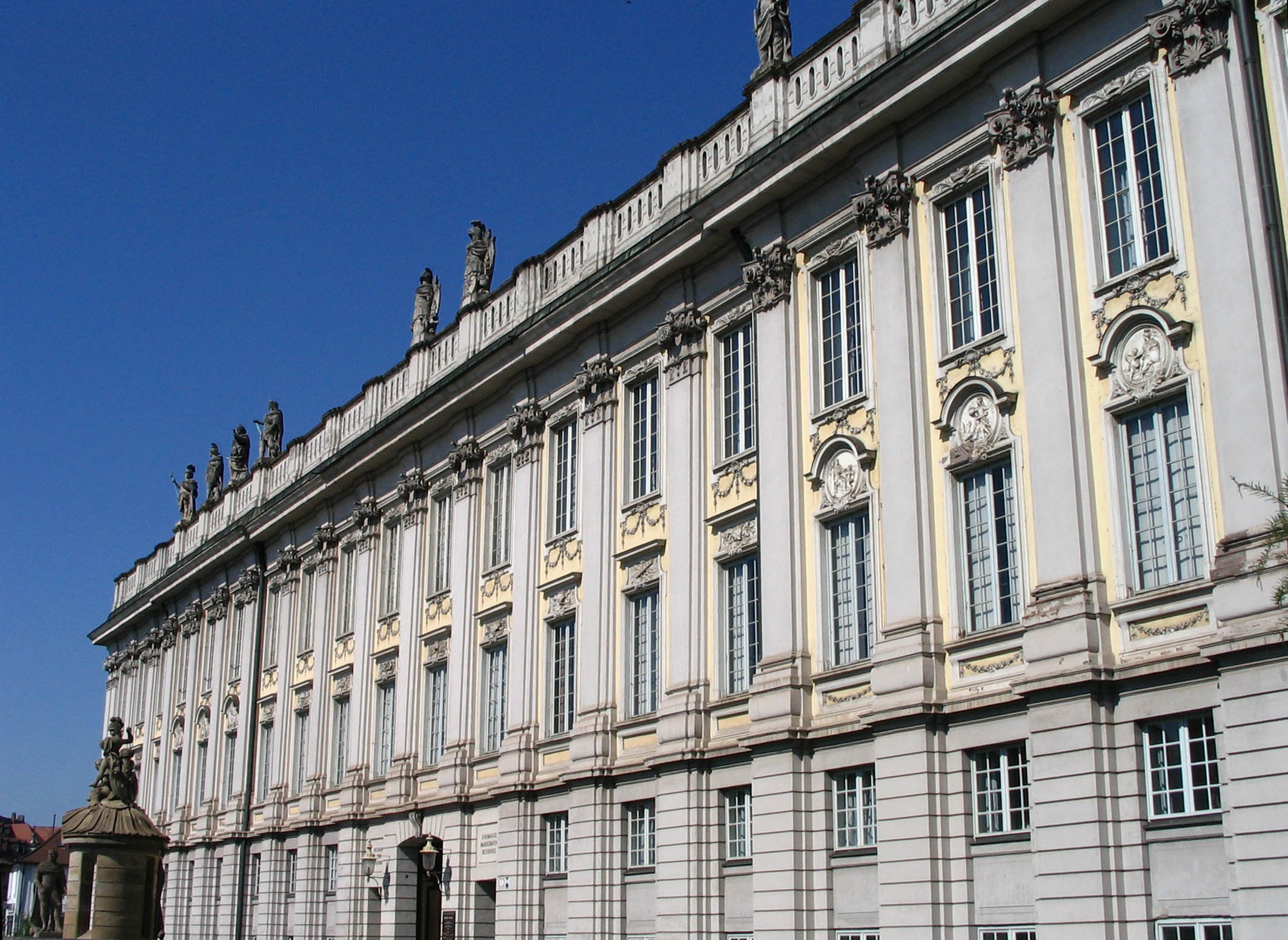 Prunkfassade der Ansbacher Residenz mit dem linken Schilderhäuschen mit Puttengruppe von Domenico Ferretti am Haupteingang